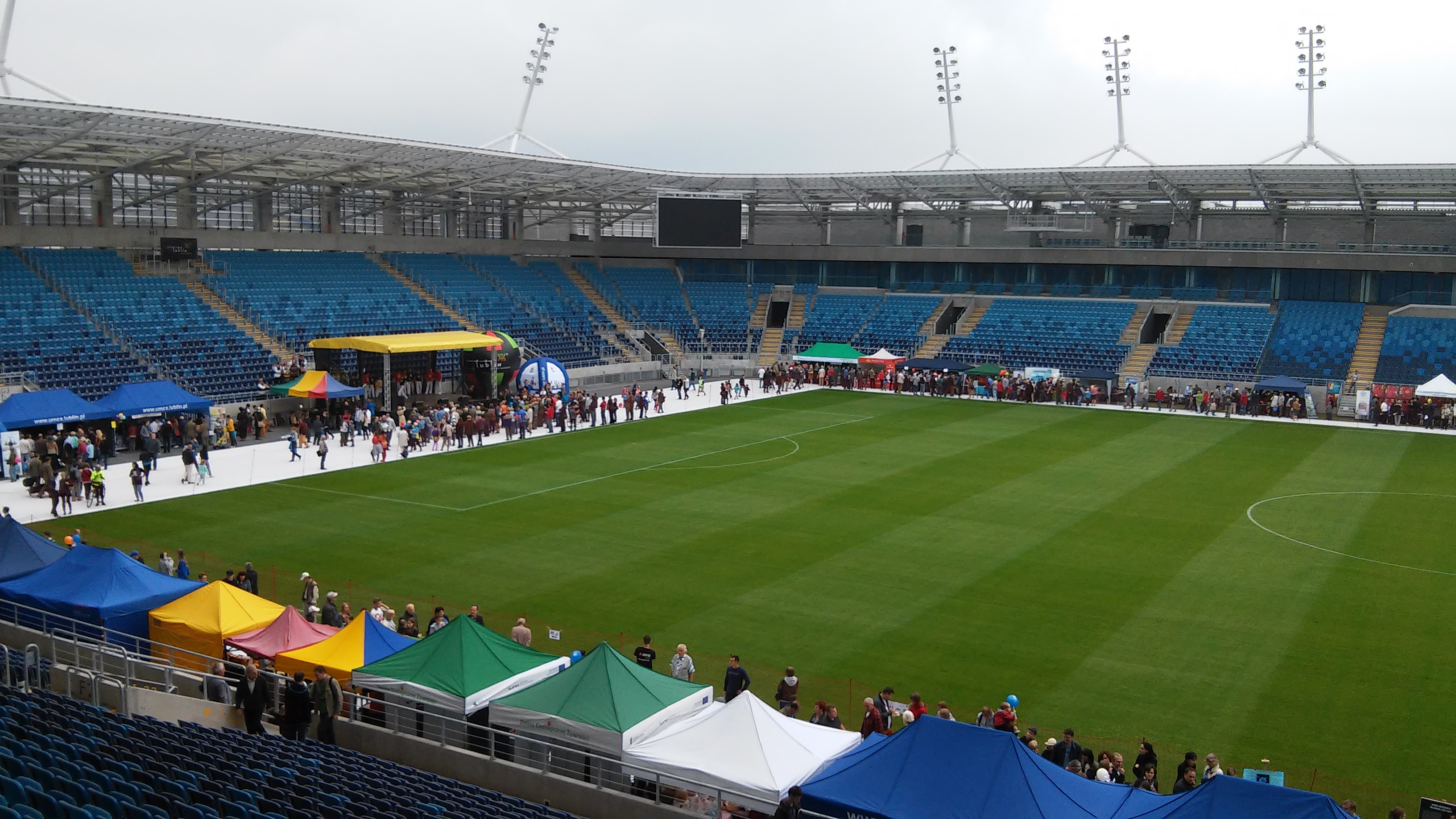 Arena Lublin podczas XI Lubelskiego Festiwalu Nauki.